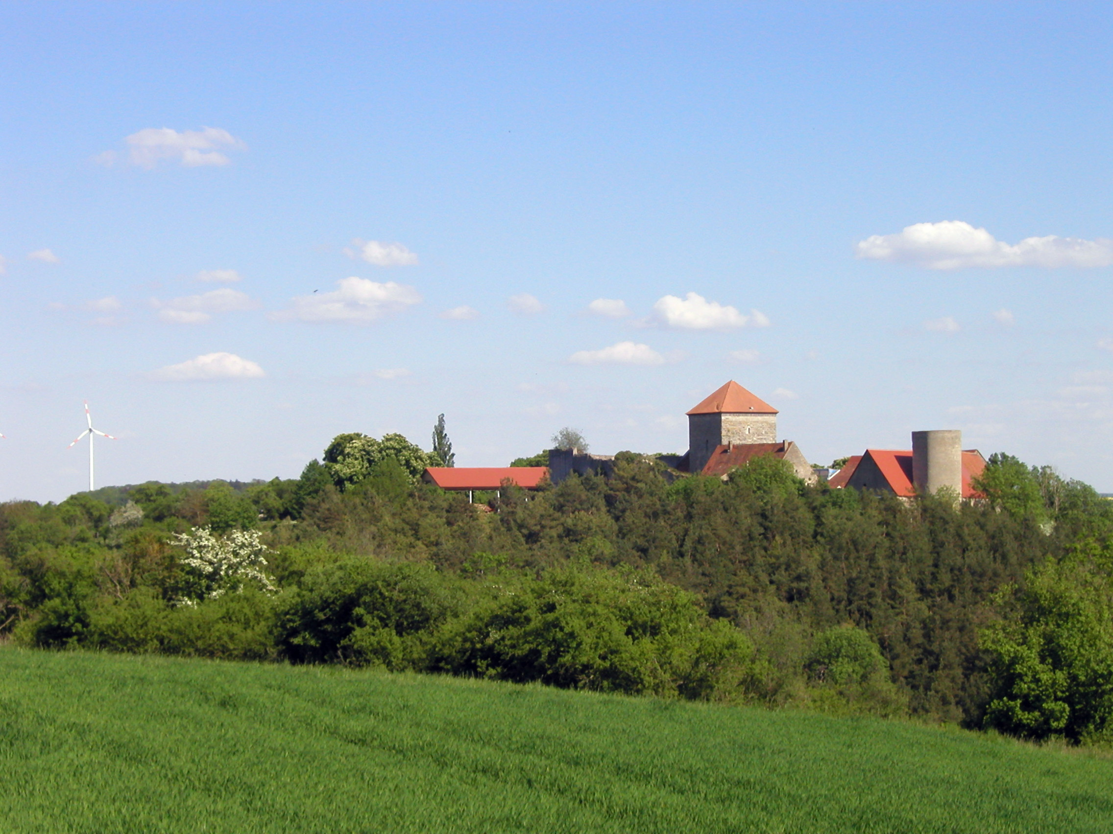 Burg Brauneck im Creglinger Ortsteil Niedersteinach